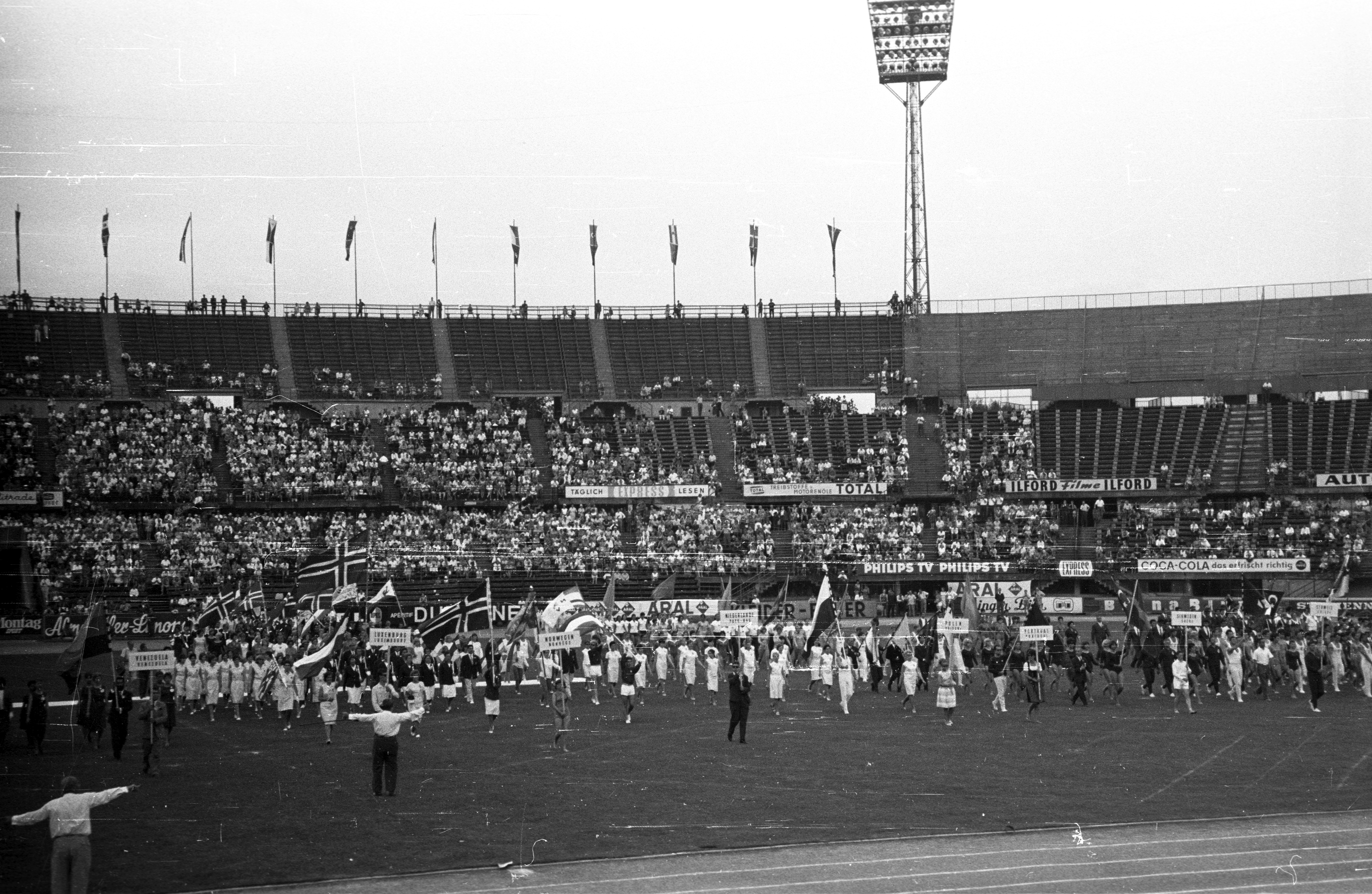 Práter (ma Ernst Happel) stadion. A IV. World Gymnaestrada megnyitója 1965. július 20-án. Location: Austria, Vienna Tags: mass games, stadium Title: Práter (ma Ernst Happel) stadion. A IV. World Gymnaestrada megnyitója 1965. július 20-án.